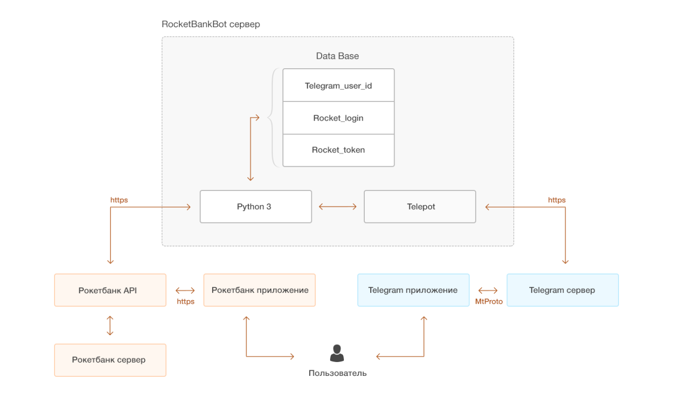 Mapa visual de cómo se transita los datos entre un servidor del banco Pocketbank y la arquitectura MTProto. El bot usa como lenguaje Python 3.